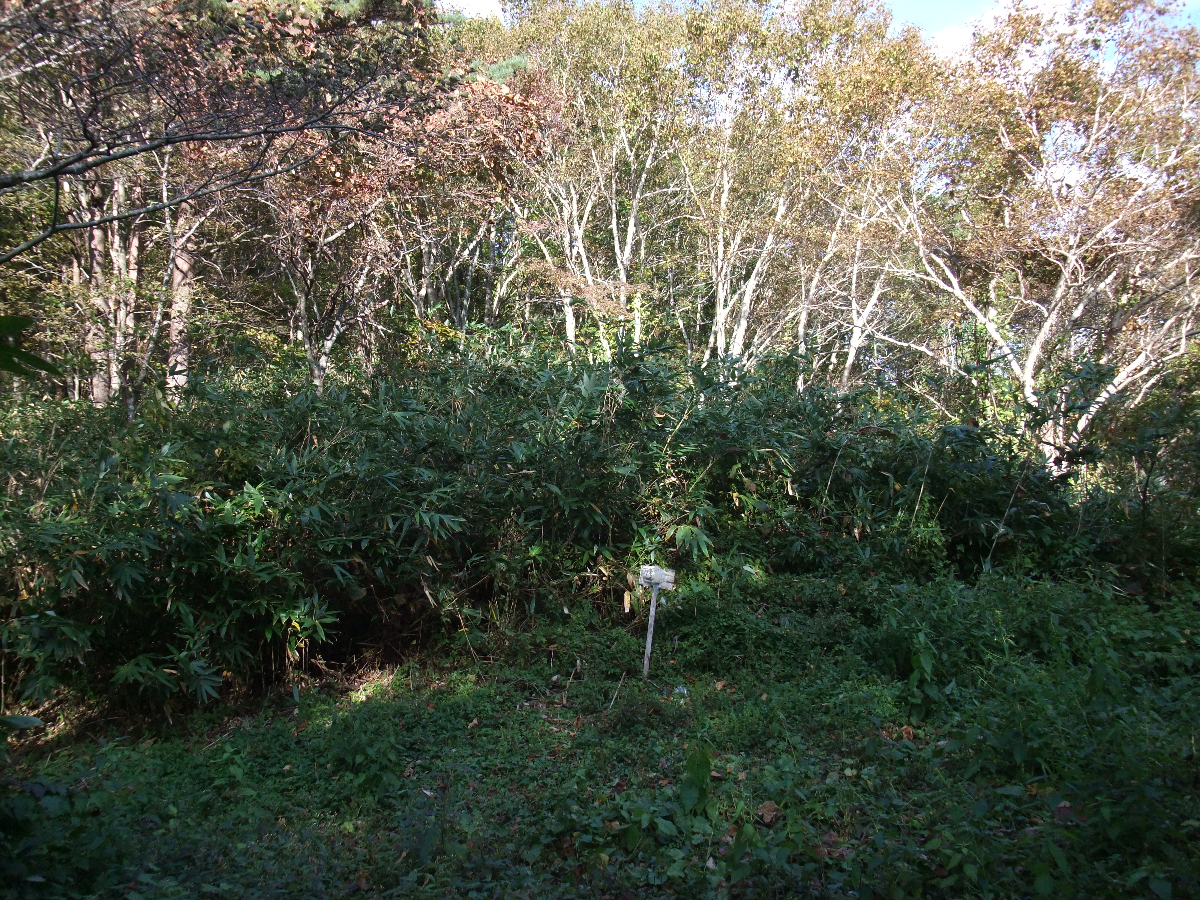 不老倉峠 左は不老倉鉱山跡、右は田子町方面（廃道）